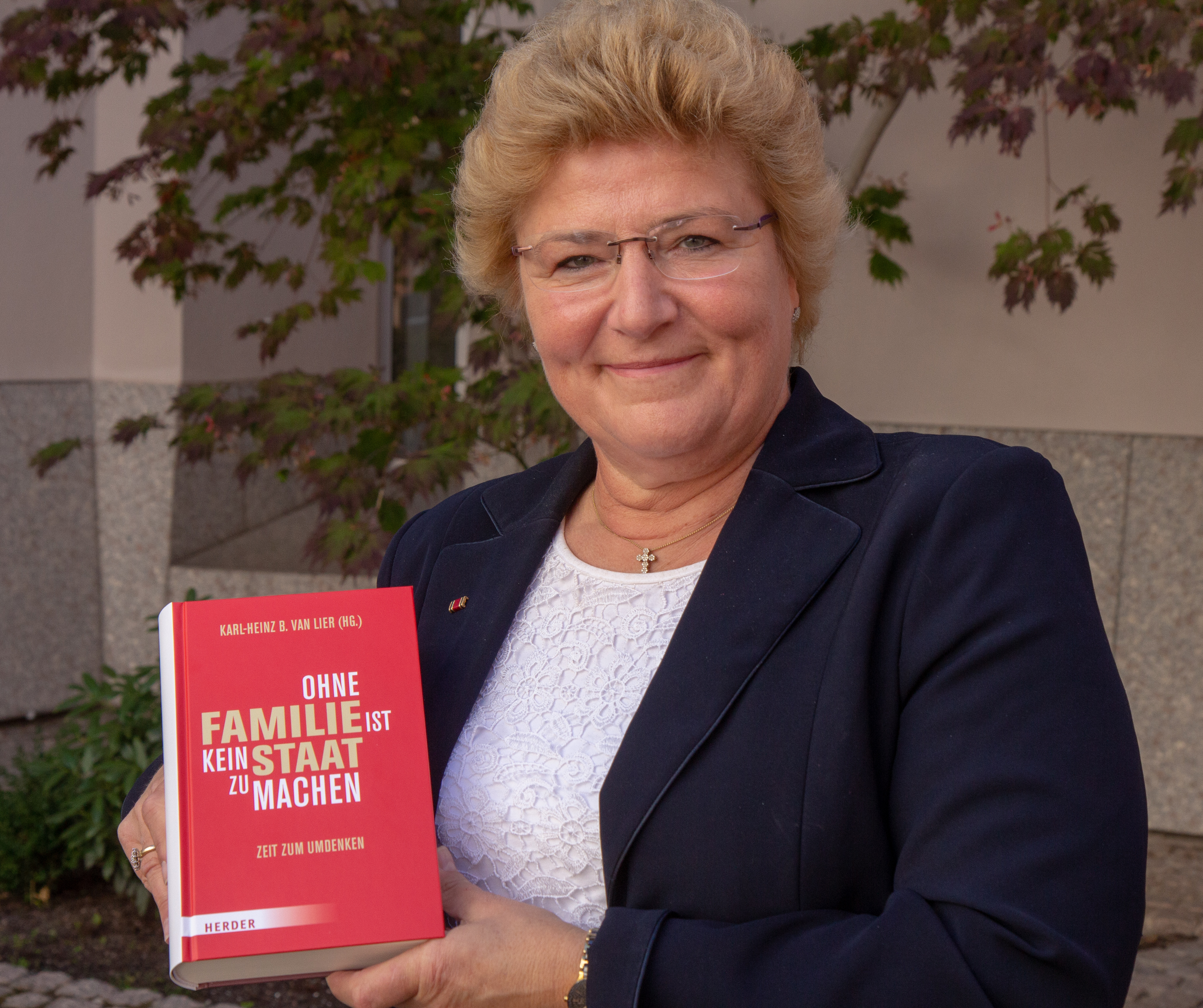 Vorstellung des Buches "Ohne Familie ist kein Staat zu machen" im Erbacher Hof in Mainz u.a. mit Paul Kirchhof, Sylvia Pantel, Christian Baldauf, Bischof Peter Kohlgraf, Prof. Jürgen Borchert, Mechthild Loehr und Karl-Heinz van Lier.